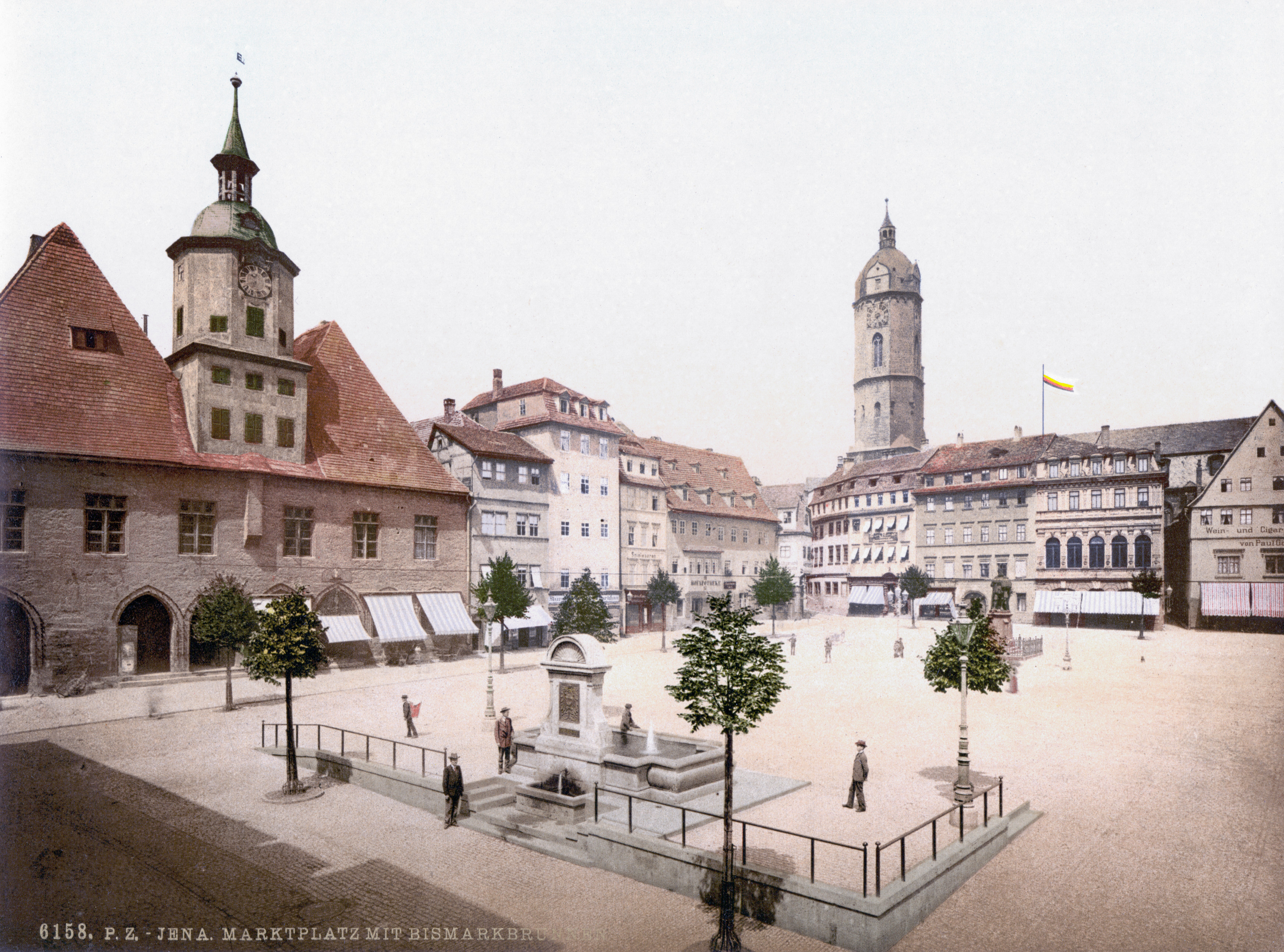 Marktplatz Bismarcksbrunnen Jena um 1900